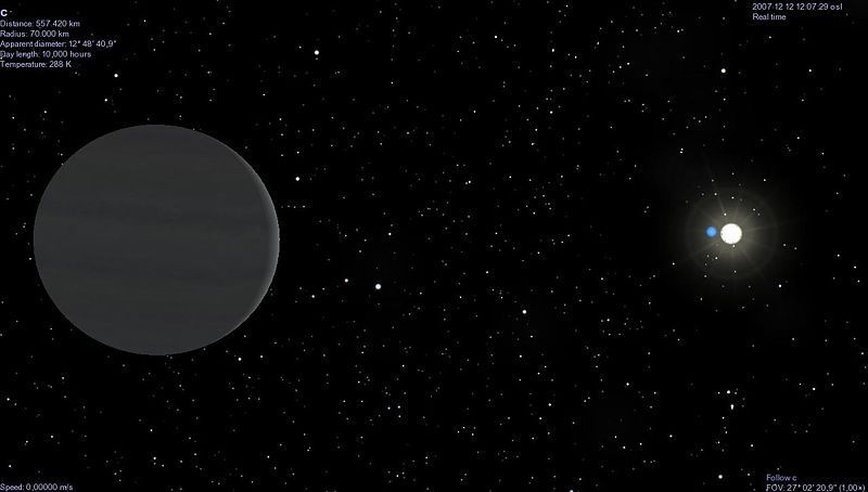 Upsilon Andromedae c es un planeta extrasolar situado a unos 44 años luz de la Tierra, en la constelación de Andrómeda.